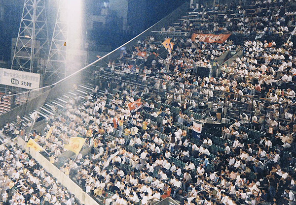 大阪球場の一塁側内野スタンド、傾斜が急になっている（1990年）